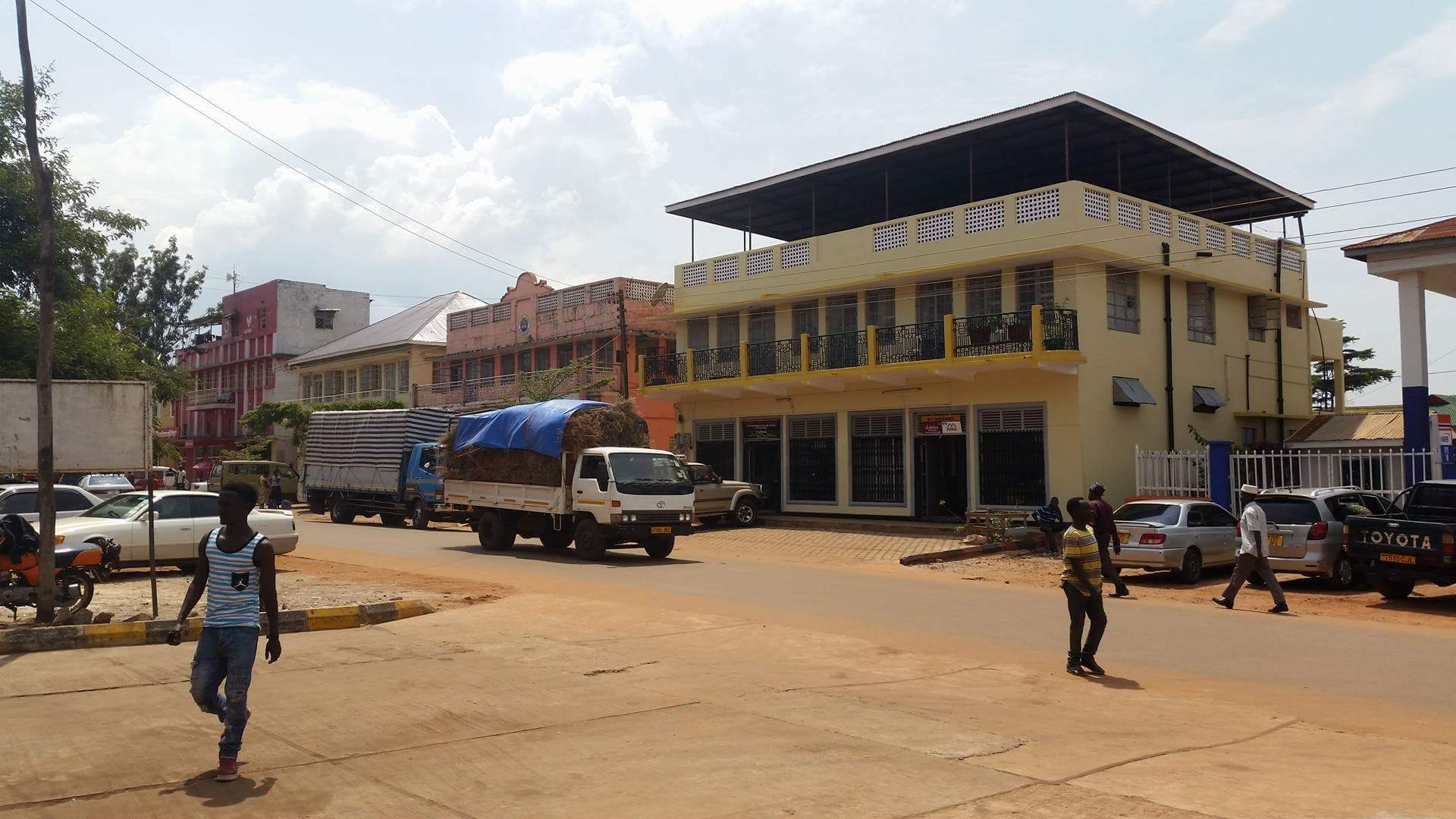 Bukoba in August 2017